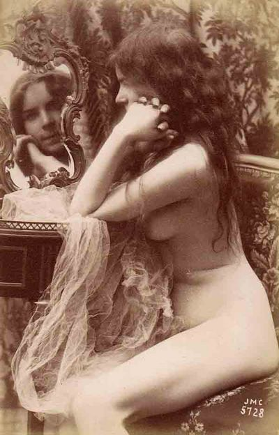 Fotografia d'estudi. Nu femení